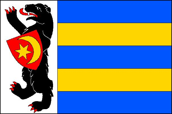 Vlajka obce Dobroměřice